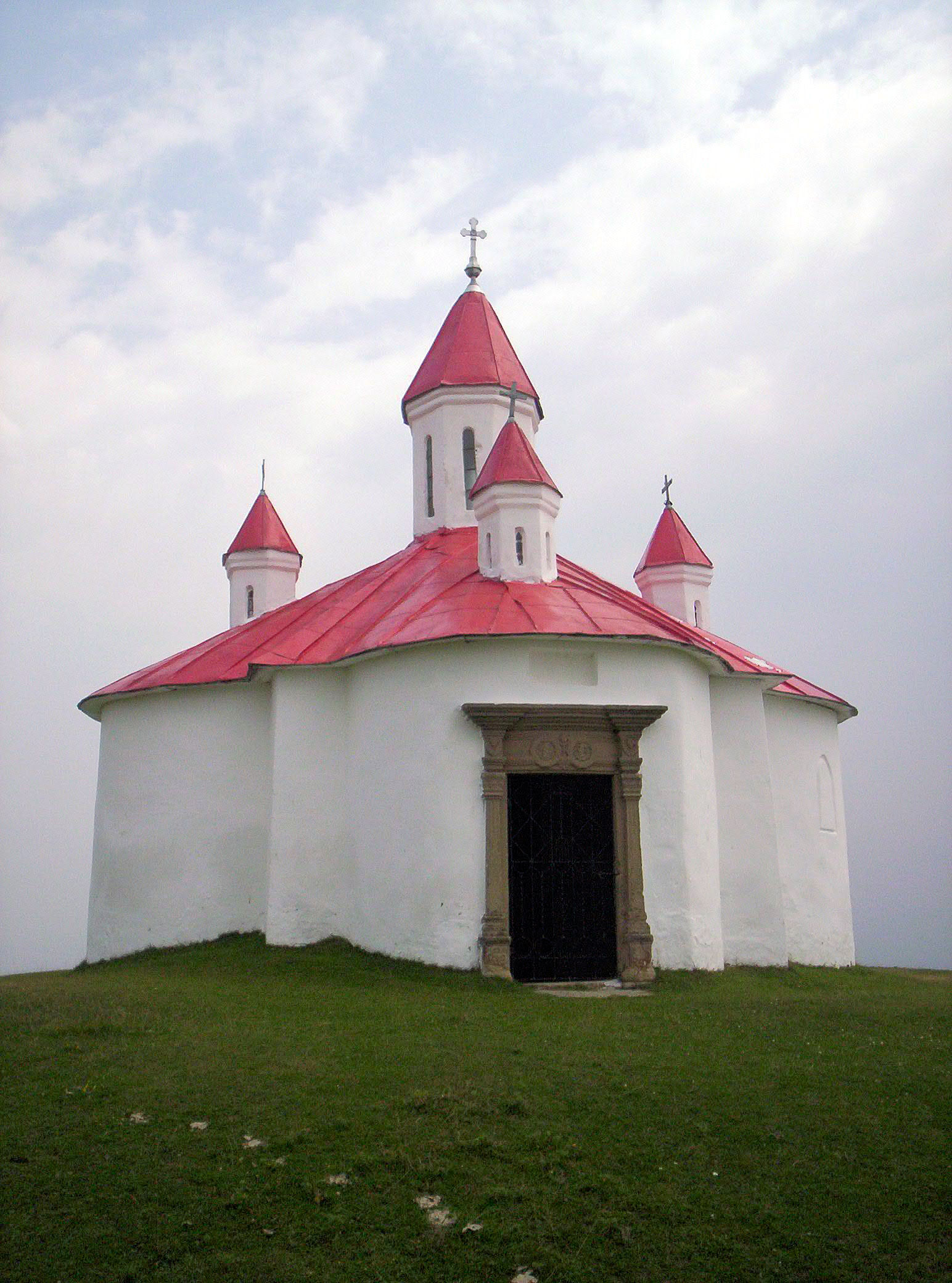 A Szent István tiszteletére szentelt körtemplom Kézdiszentlélek mellett a Perkő csúcsán 01